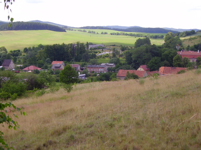 Widok na wieś› Struga (woj. Dolnośląskie)